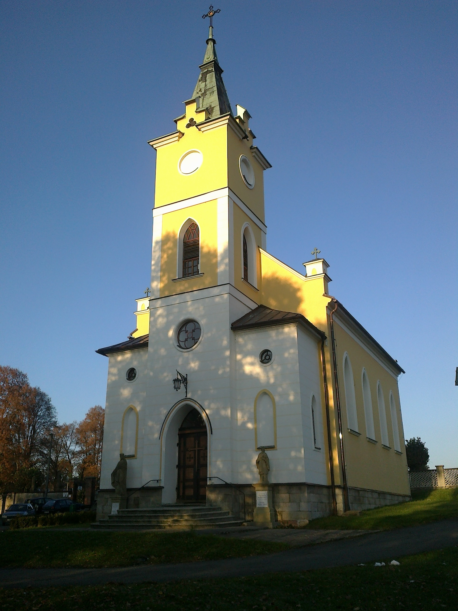 Kostel Velké Poříčí